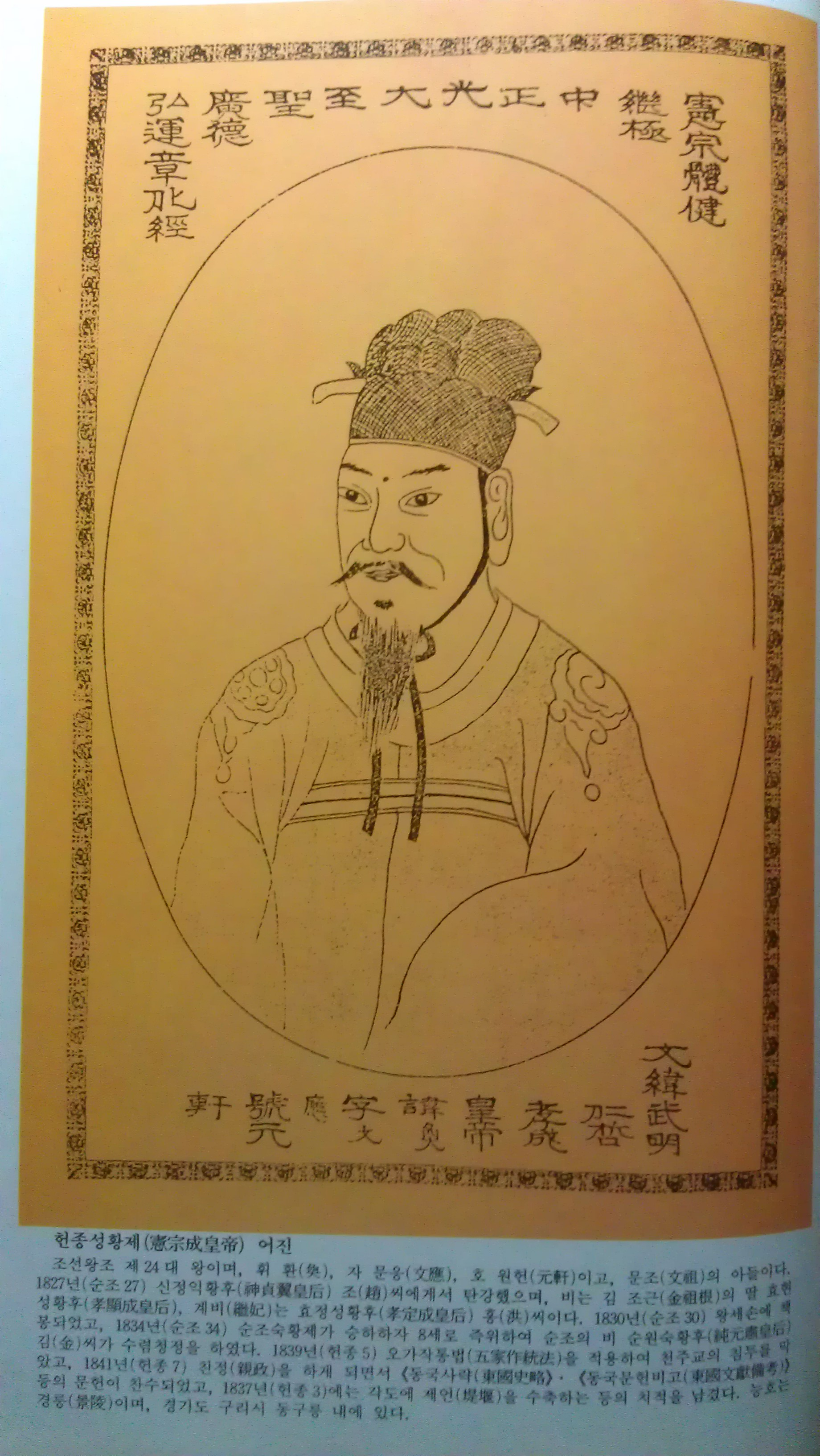 中文（中国大陆）: 朝鲜宪宗画像。